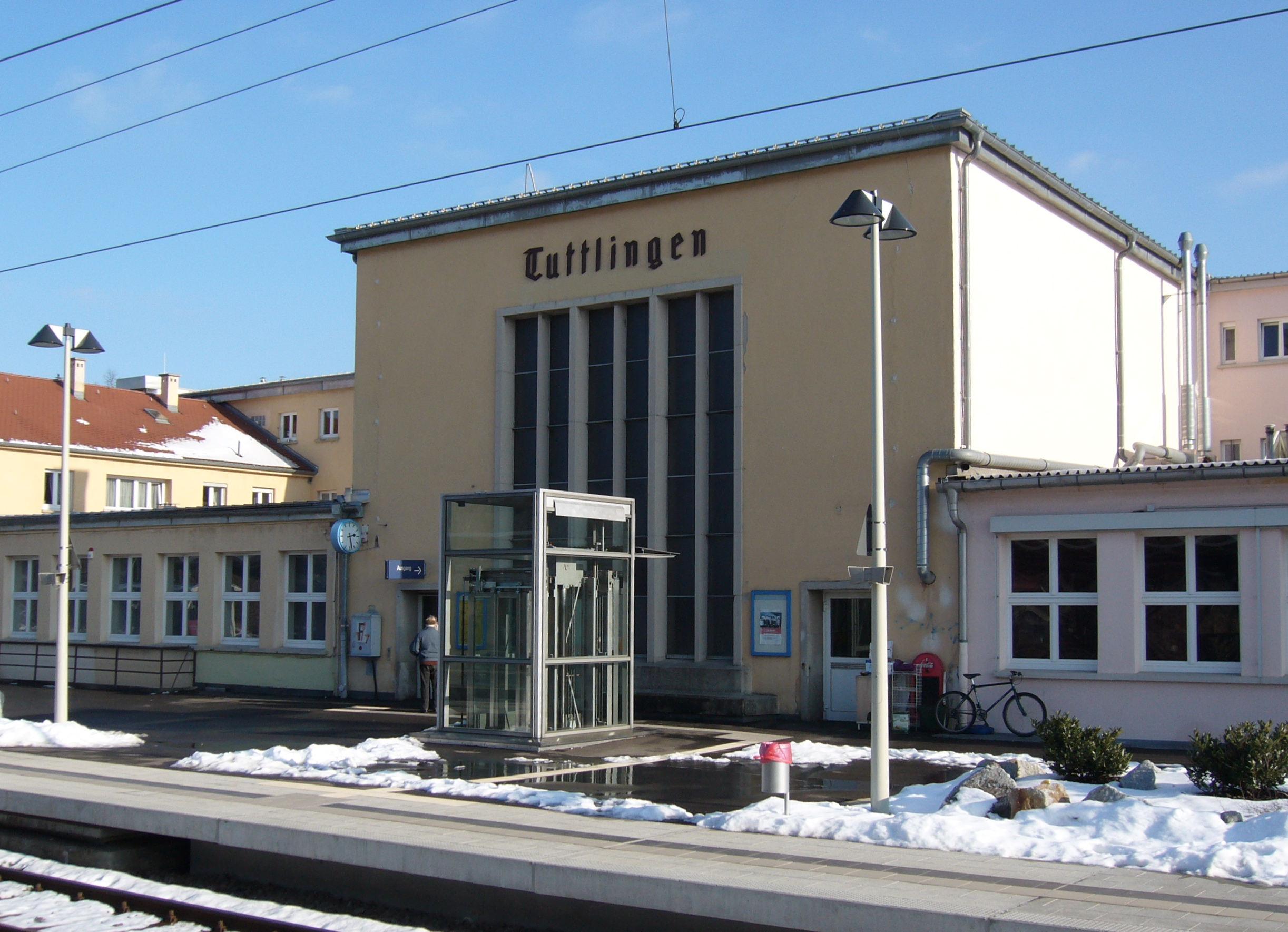 Bahnhof von Tuttlingen, gesehen von den Gleisen, Neubau von 1933, 1930er-Jahre-Stil. Baden-Württemberg, Deutschland.